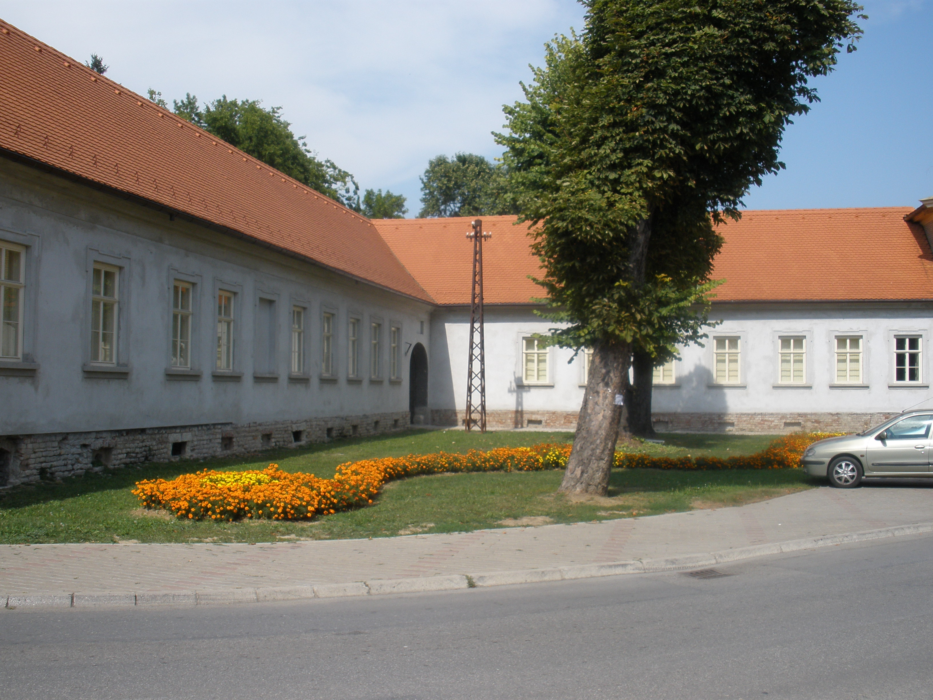 Muzej Brodskog Posavlja u Slavonskome Brodu.